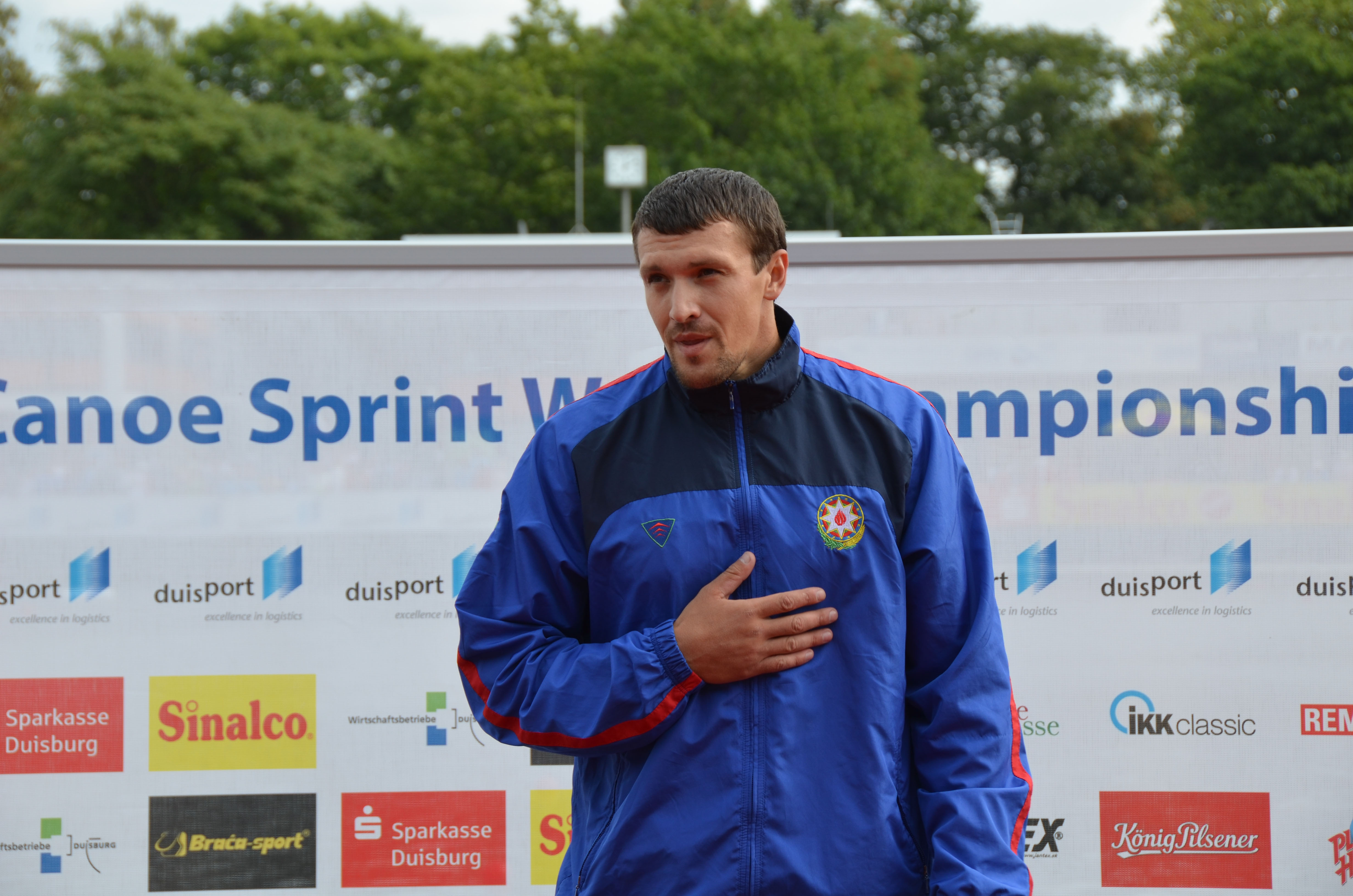 2013 ICF Canoe Sprint World Championships in Duisburg - Alle Ergebnisse/Teilnehmer unter: Gewinner: AZE - AZERBAIJAN DEMYANENKO, Valentin RUS - RUSSIA SHTYL, Ivan ESP - SPAIN BENAVIDES LOPEZ DE AYALA, Alfonso